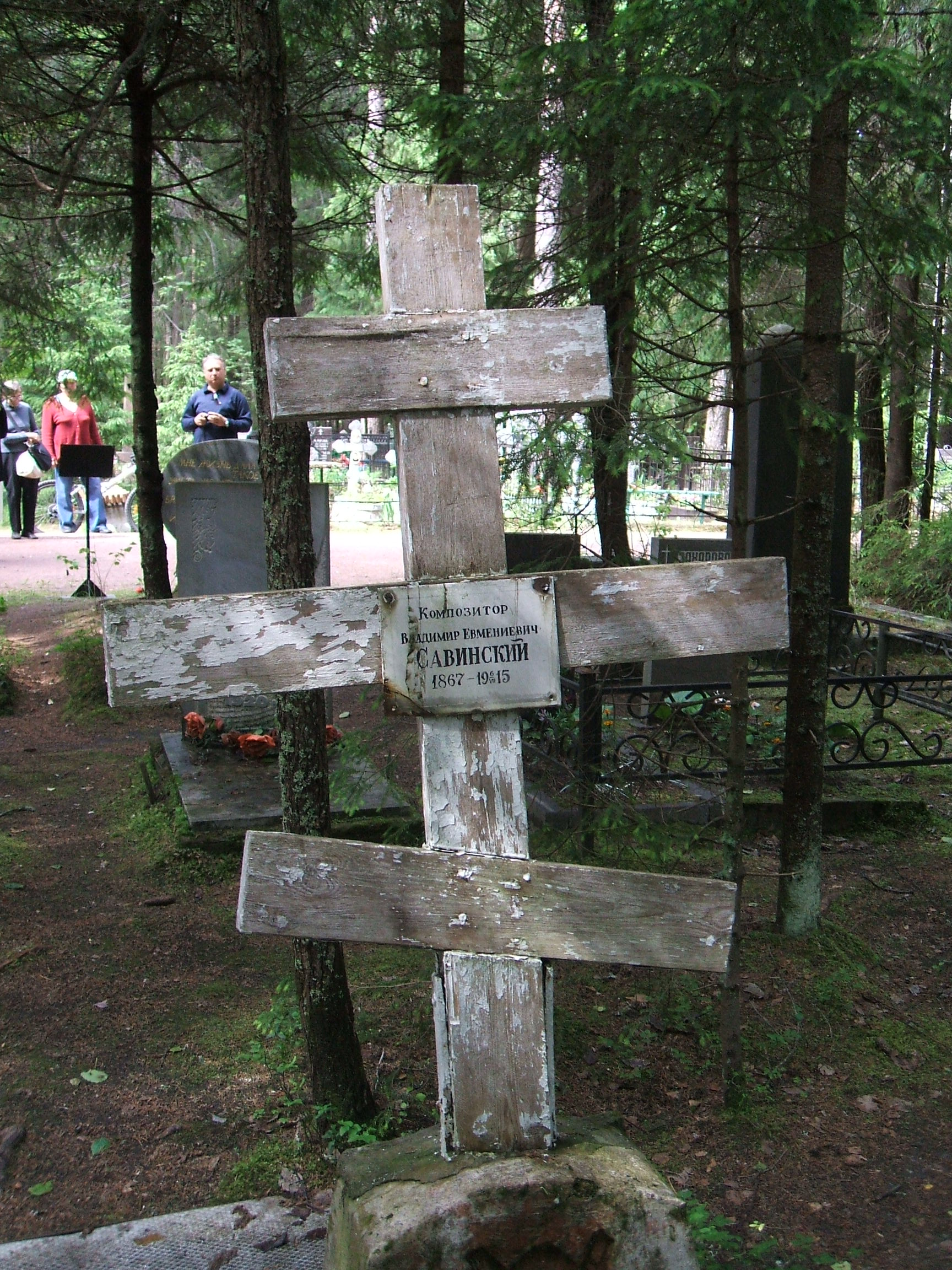 фото самой старой из обнаруженных могил на Комаровском Некрополе под СПб